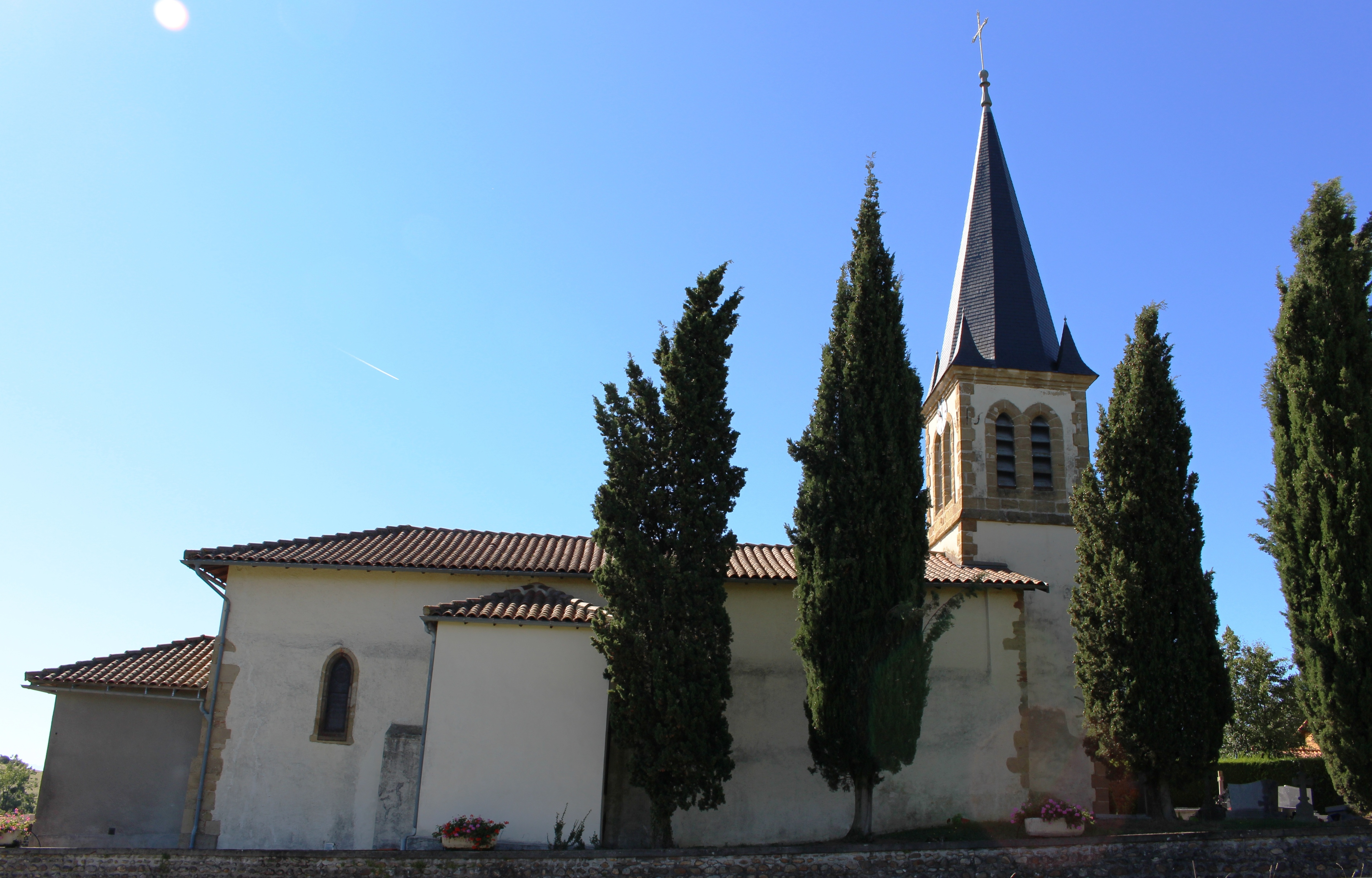 Église Saint-Pierre de Sabarros (Hautes-Pyrénées)